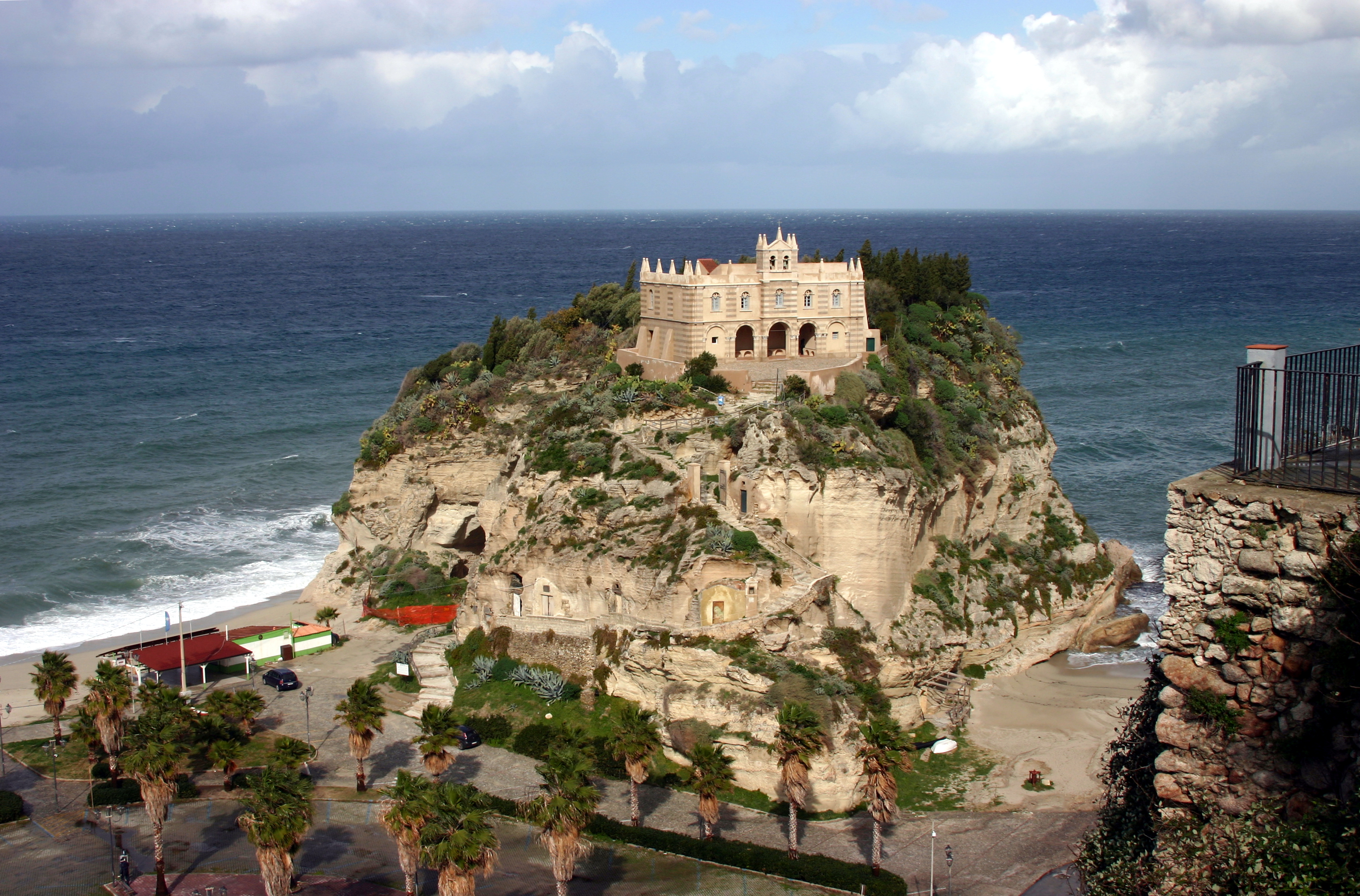 Santa Maria dell'Isola - Tropea